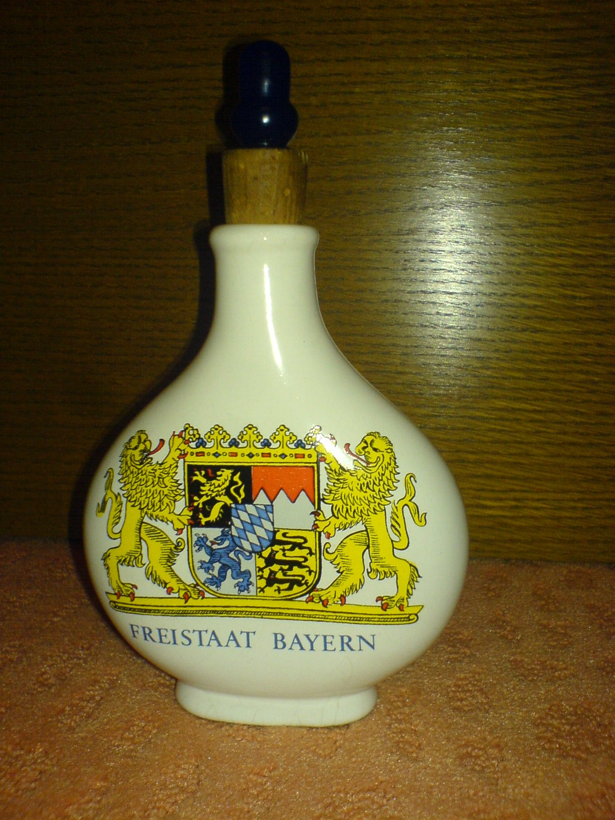 Boarisch: Porzelan-Schnupftabak-Dosn